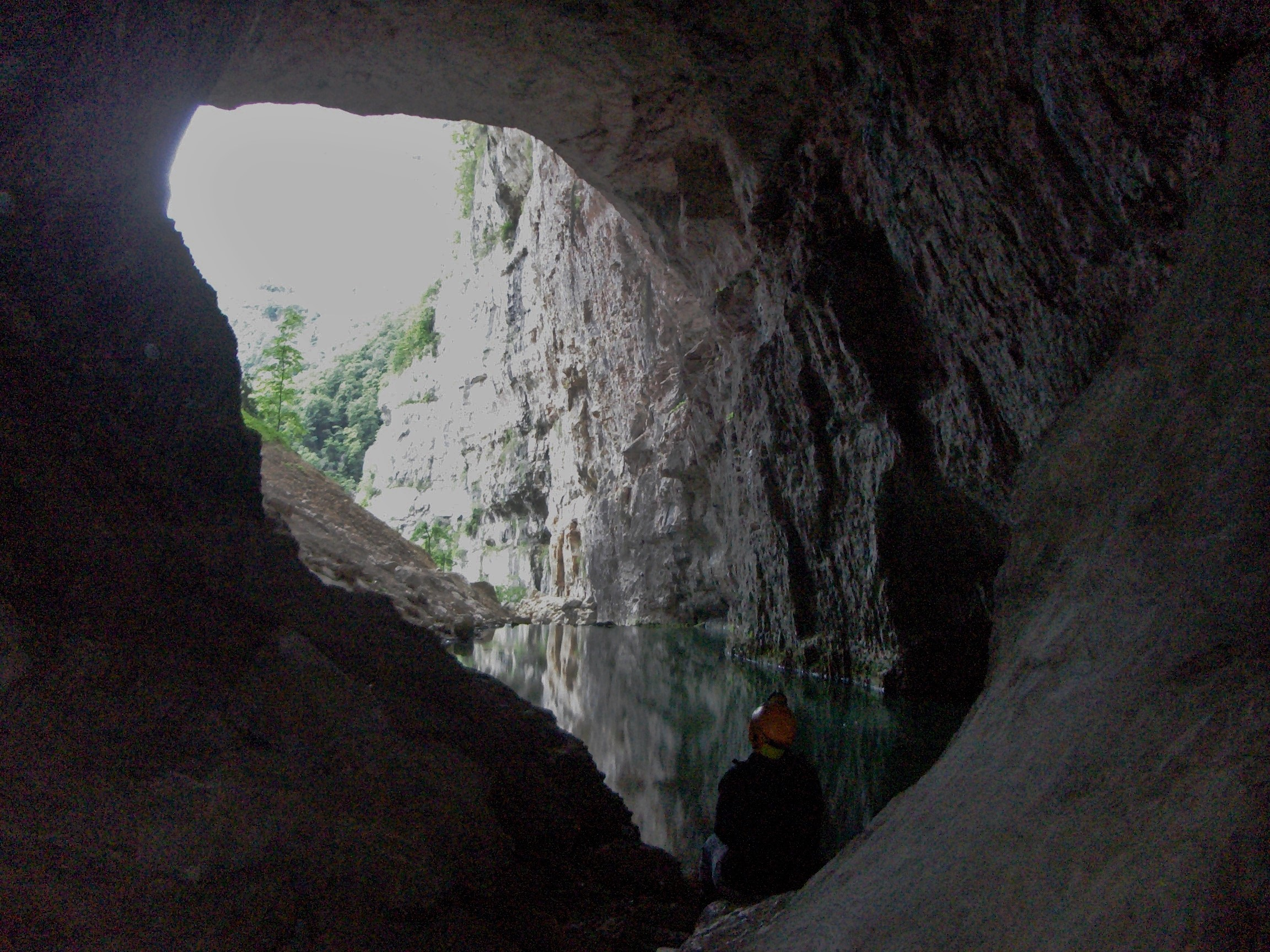 Le porche de Bournillon est le plus haut du Dauphiné.